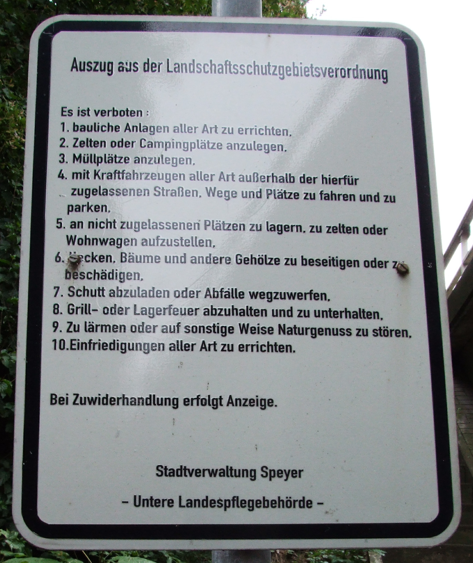 Binsfeld (Speyer), Schild mit Auszug aus der Landschaftschutzgebietsverordnung